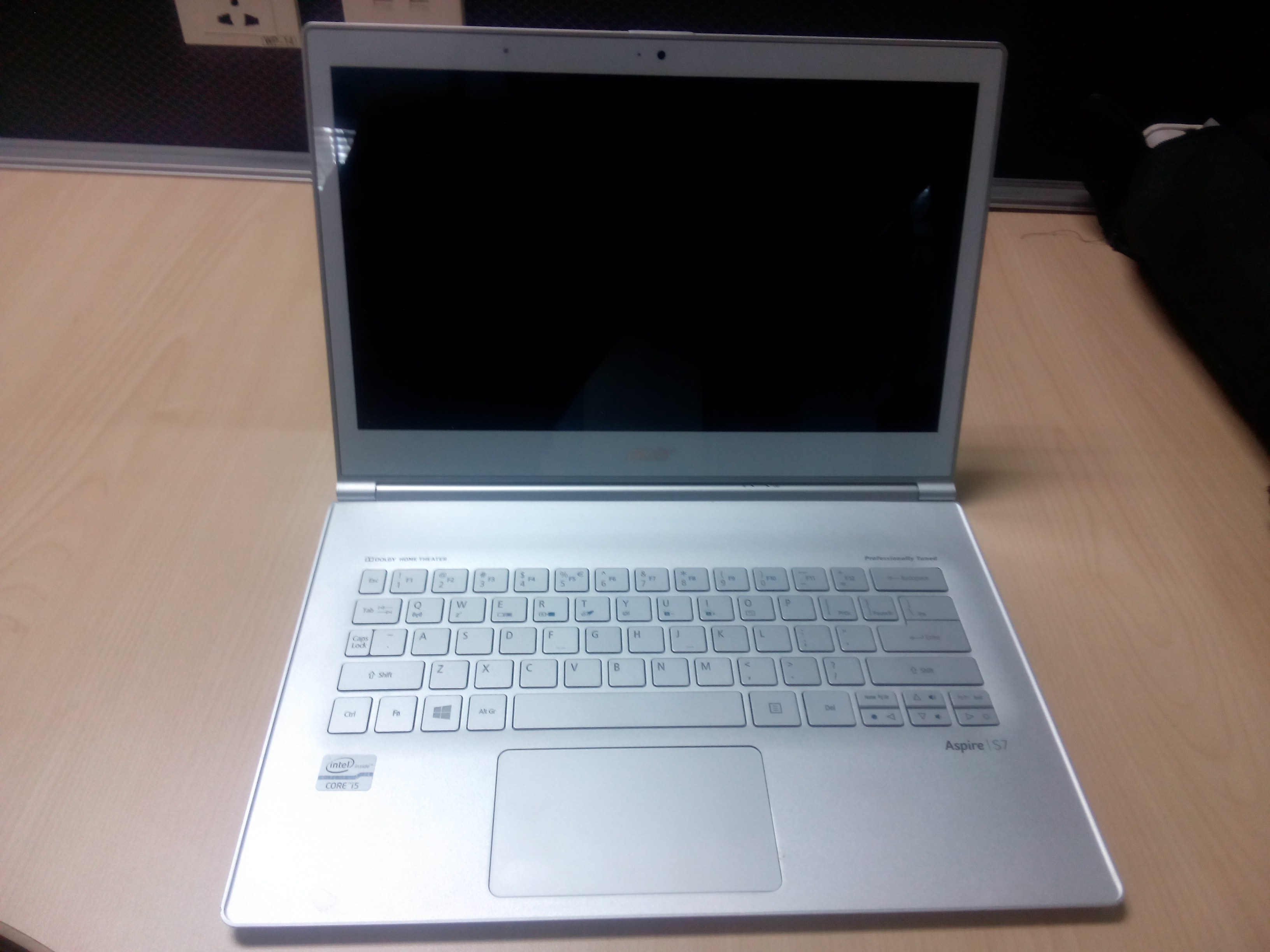 宏碁Aspire S7-391超極本，外殼用康寧玻璃製作。